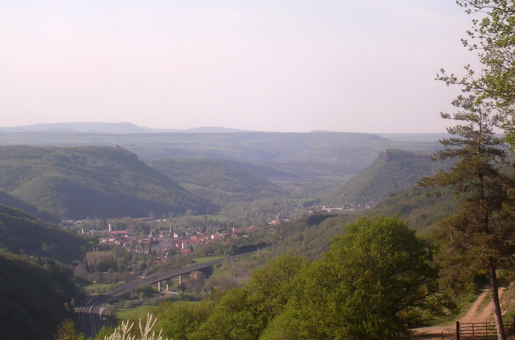 Massiac: vue depuis la route de La Chapelle-Laurent